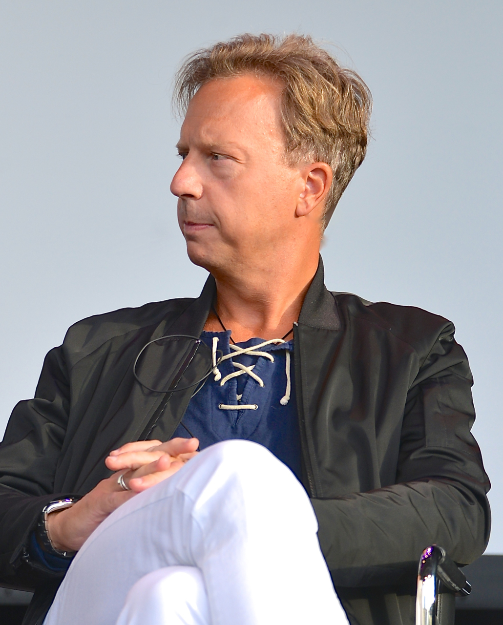 Torbjörn Flygt i Stockholms Kulturhus under Stockholms Kulturfestival 2013.